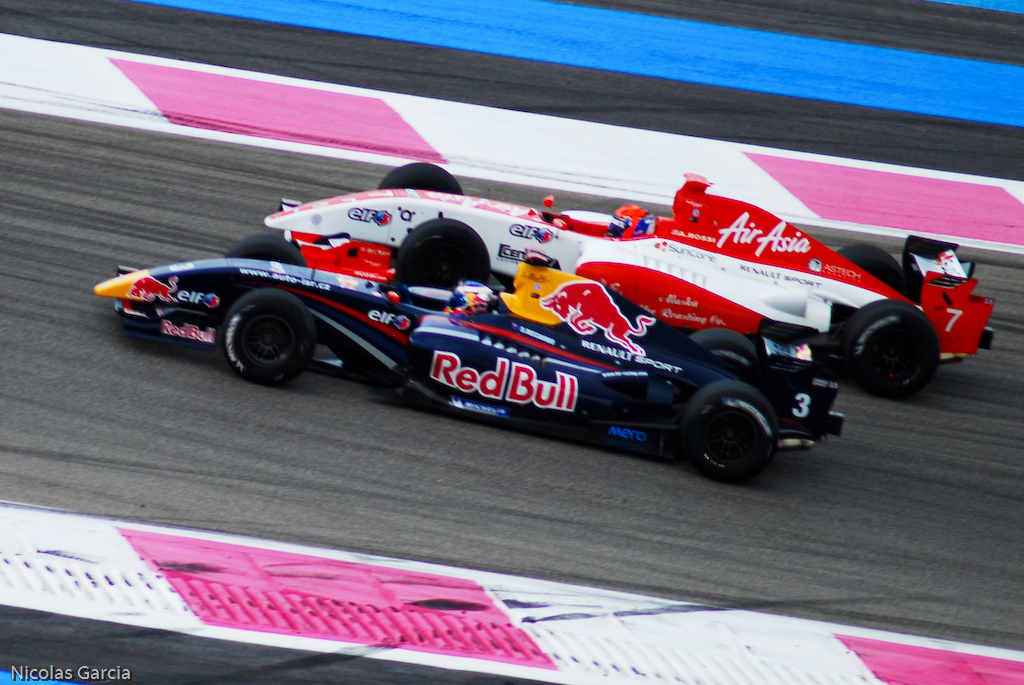 3 Daniel Ricciardo - ISR VS #7 Alexander Rossi - Fortec Motorsport - 2011 Formula Renault 3.5 Series - Circuit Paul Ricard - Race 1